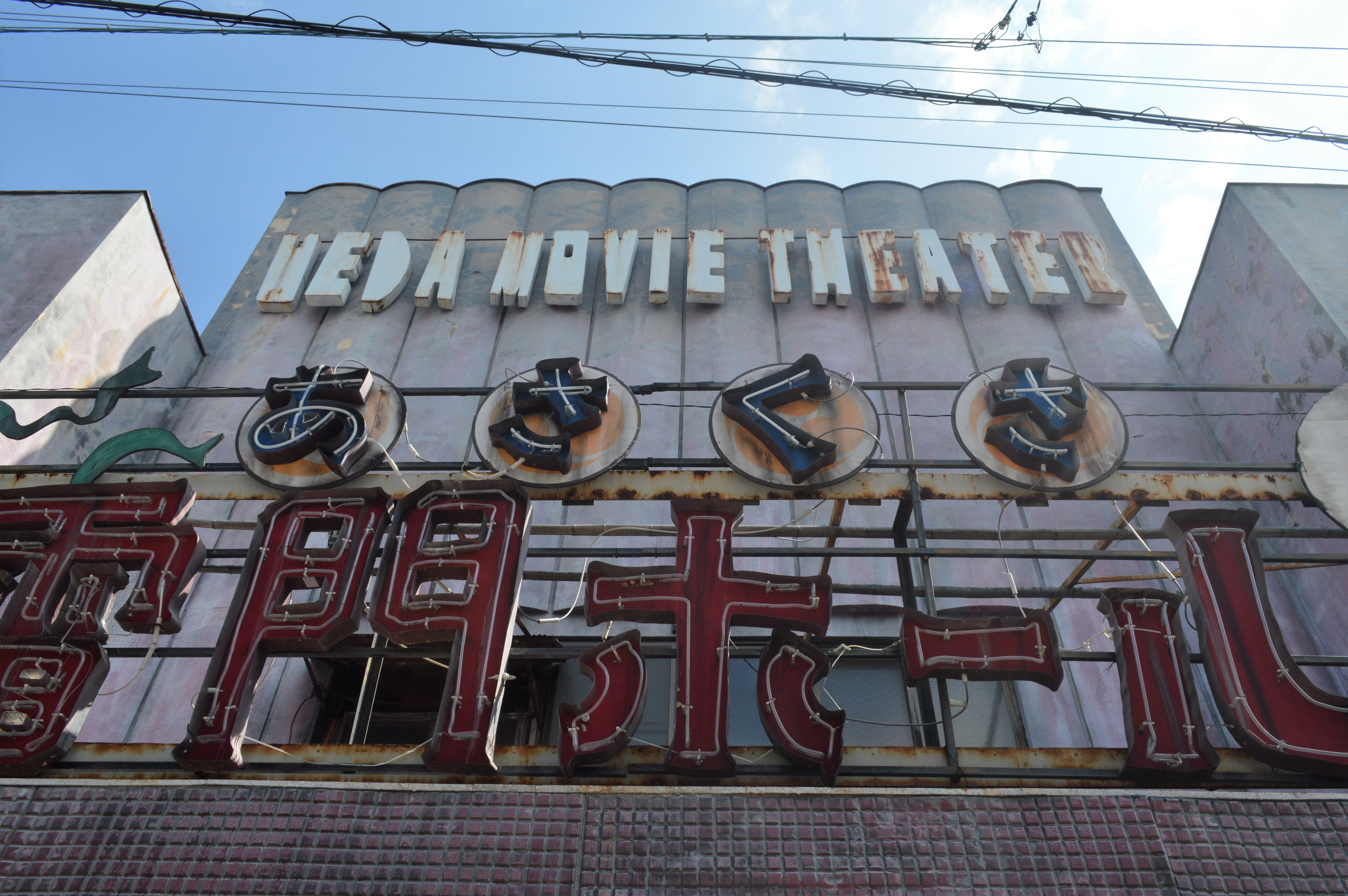 長野県上田市の映画館である上田映劇。